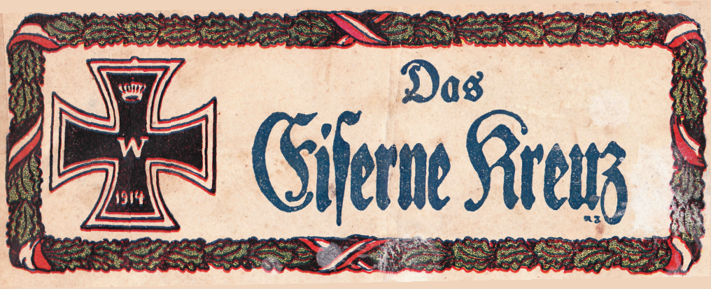 Die Versprengten (Das eiserne Kreuz Heft 6). Serienbild des Heftromans.